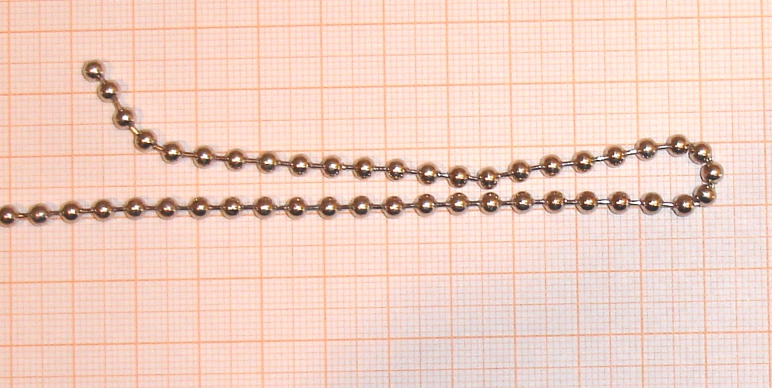 Von UvM für Fontänenversuche verwendete Kugelkette, auf Millimeterpapier